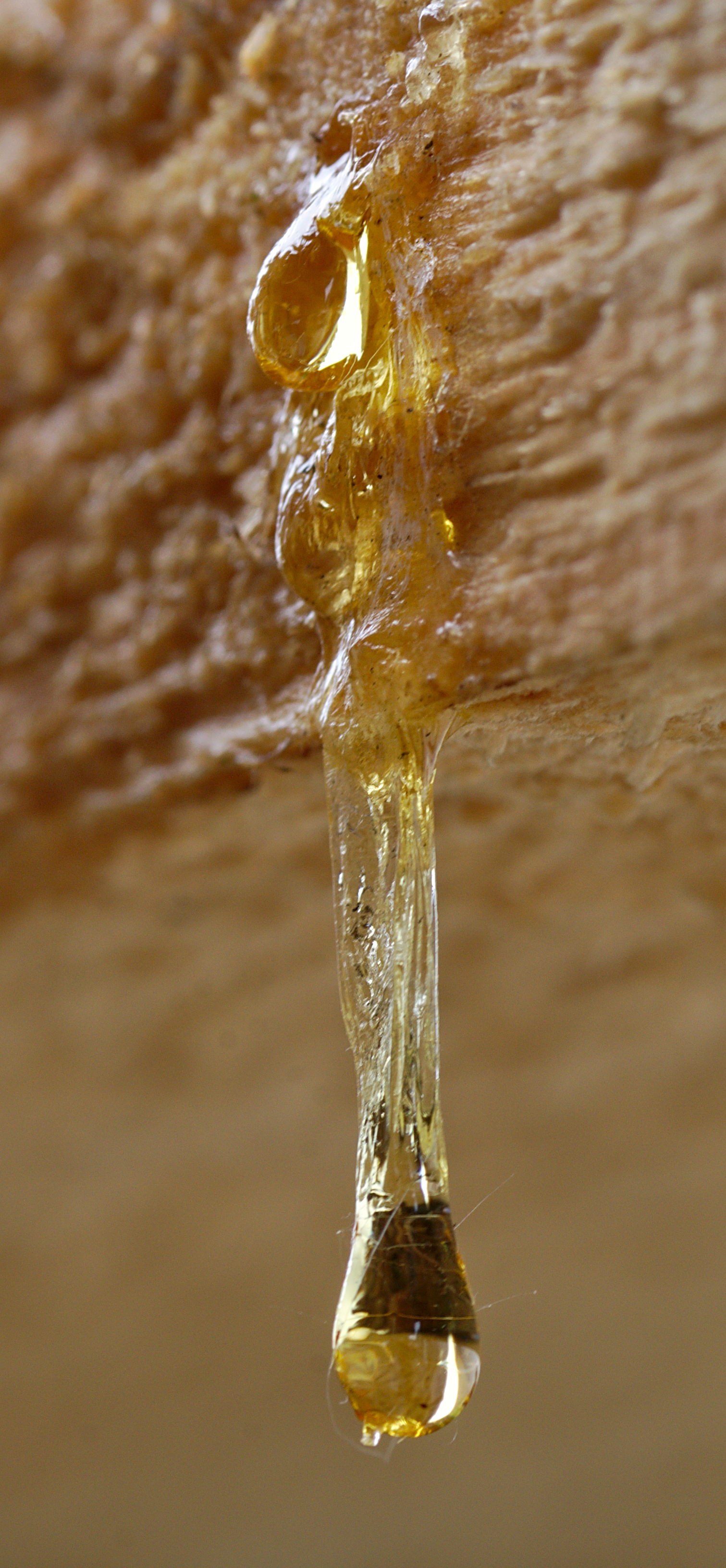 Harz tritt an Bauholz aus.